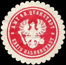 Sealing stamp Title: Amt Gross Quenstedt - Kreis Halberstadt Description: rot, weiß, geprägt Place: Gross Quenstedt size: 3 cm